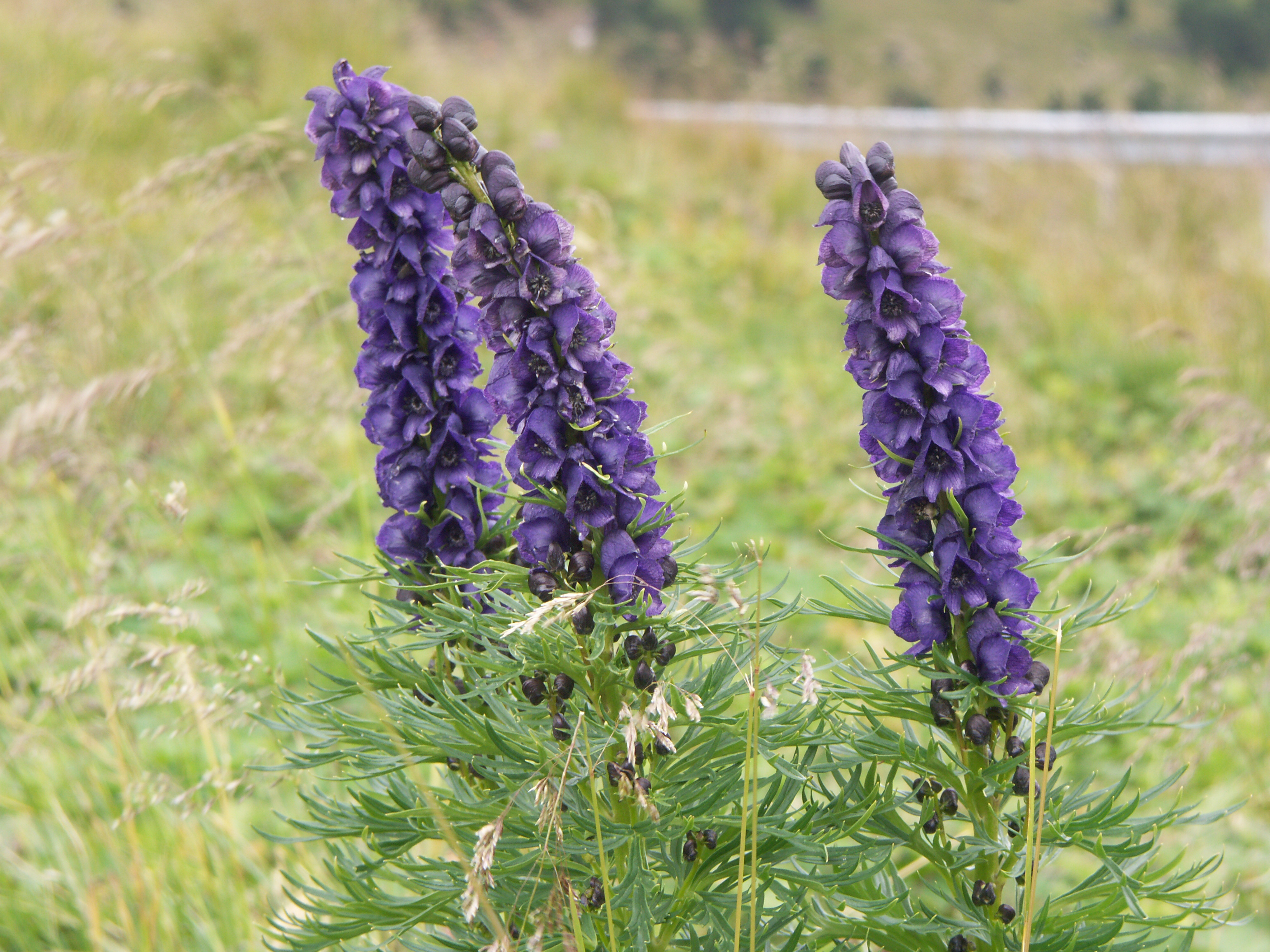 Blütenstände des Blauen Eisenhuts (Aconitum napellus), Italien, Dolomiten, Sellajoch